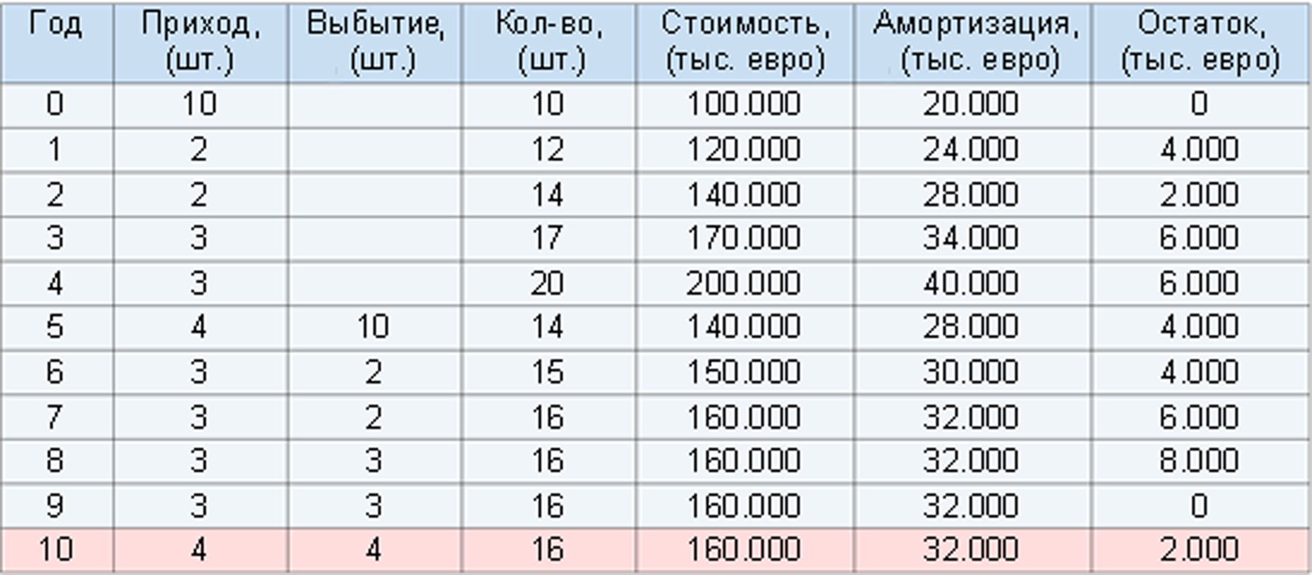 Суммарная форма таблицы